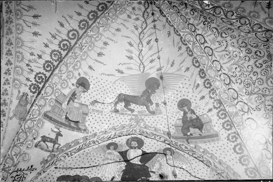 Kalkmålningar, Johannes Rosenrod, 1437. Korets norra valv. Fältet inom röda linjen nymålat. Kategori: (03) Kalkmålningar Kalkmålningar, Johannes Rosenrod, 1437. Korets norra valv. Fältet inom röda linjen nymålat.